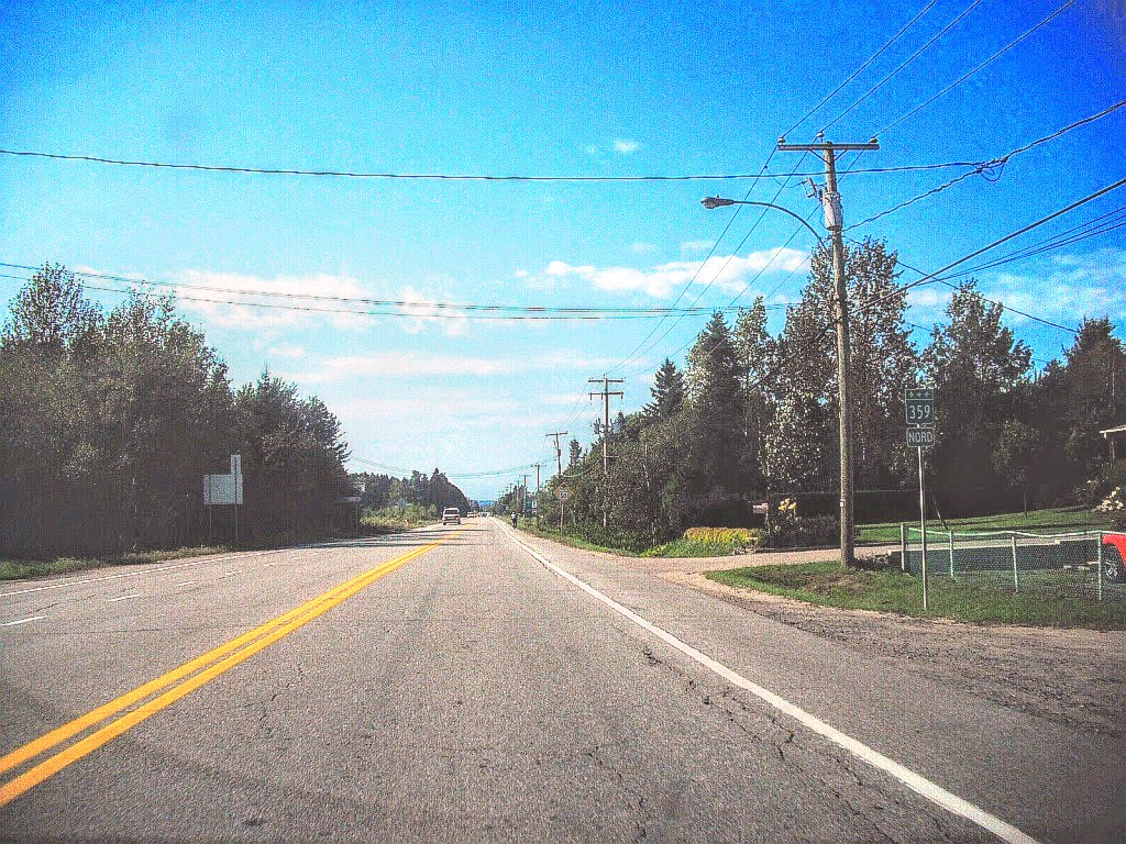 Vue sur la route 359 direction nord, à Shawinigan, secteur Lac-à-la-Tortue.